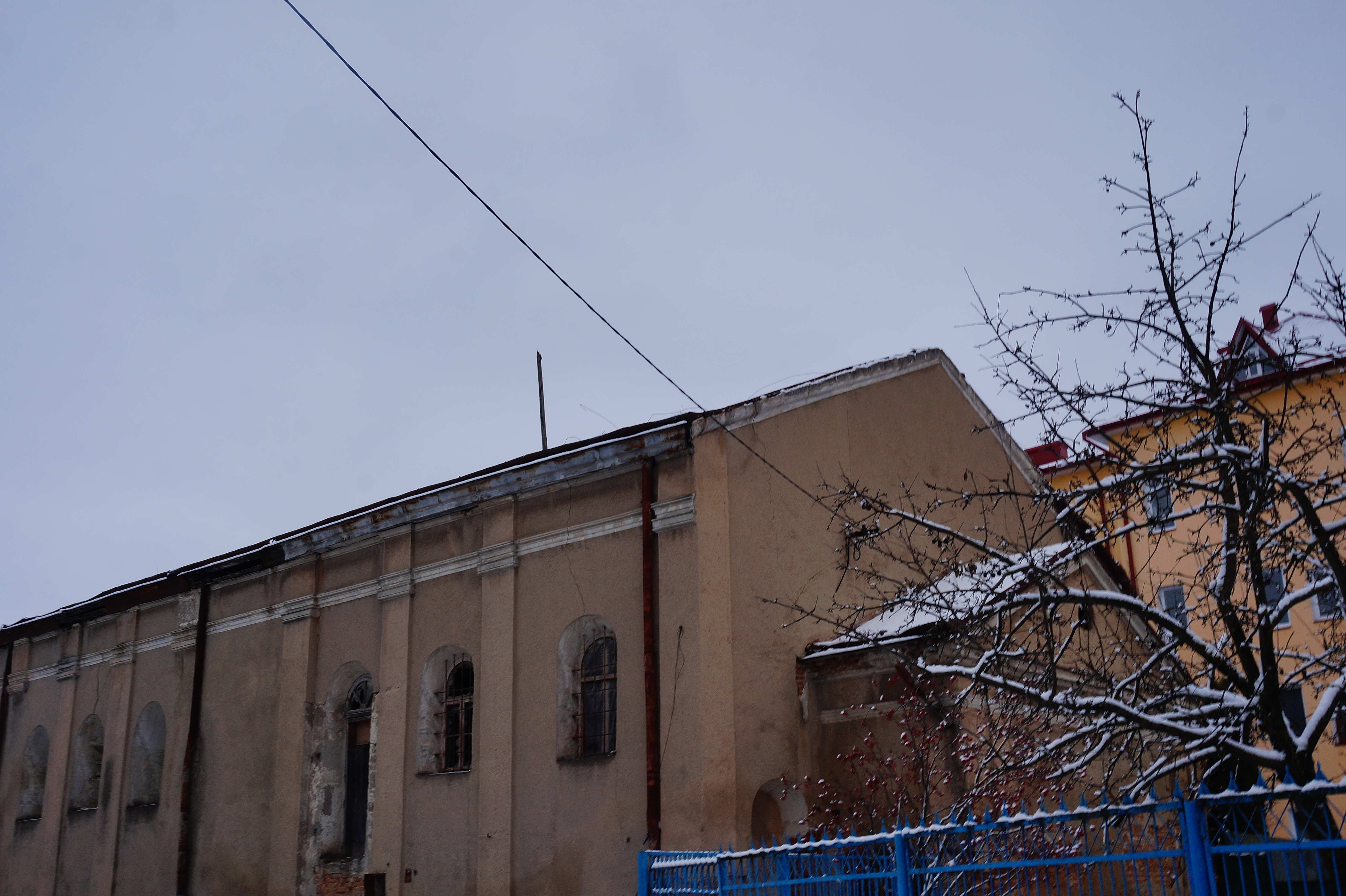 Синагога (мур.), Чортків, вул. Гоголя, 2